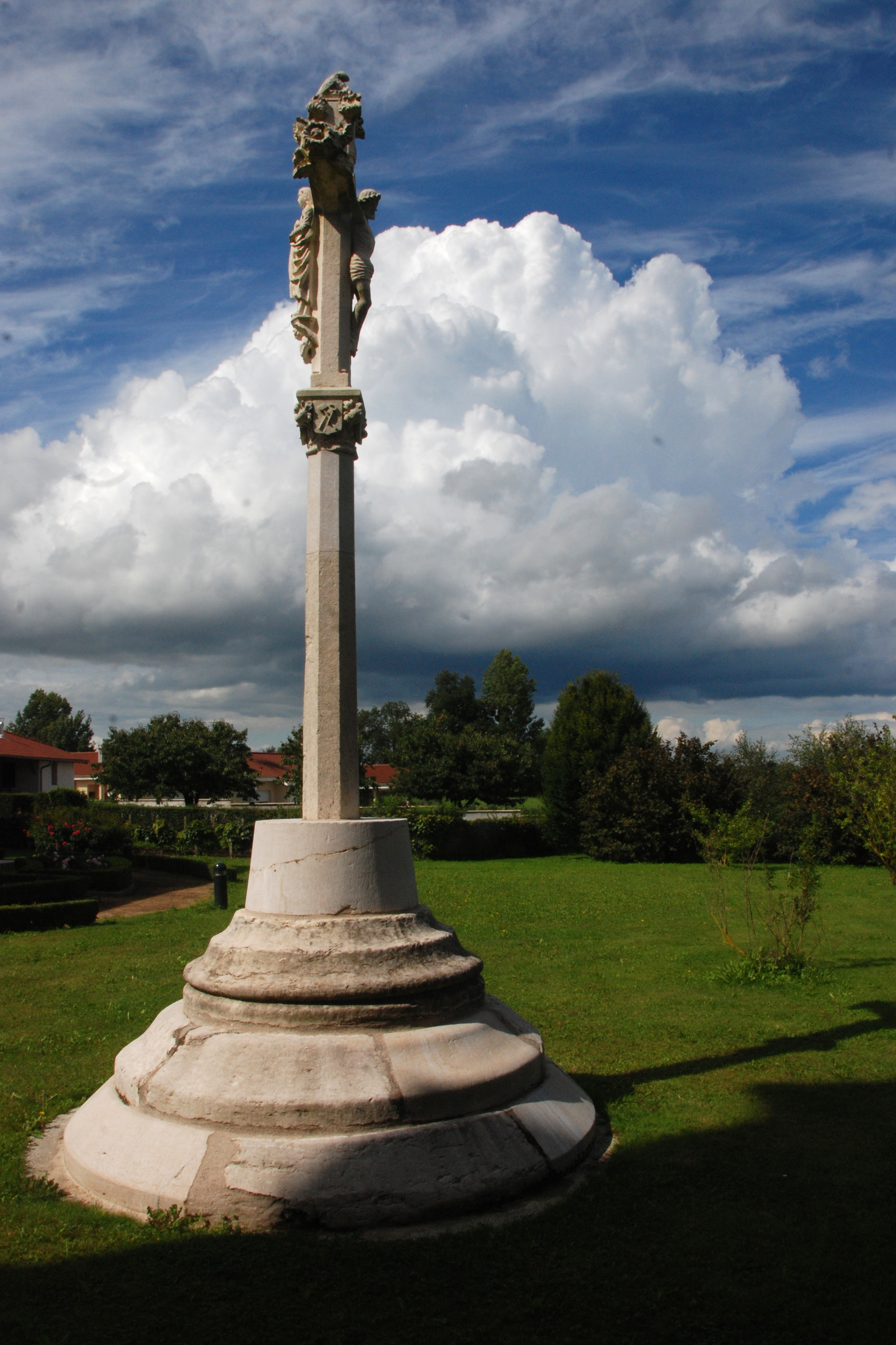 Calvaire de Curtafond